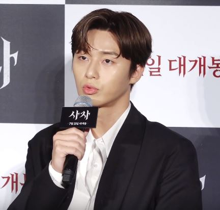 영화 '사자' 제작보고회가 26일 오전 서울 광진구 자양동 롯데시네마 건대입구점에서 열렸다.